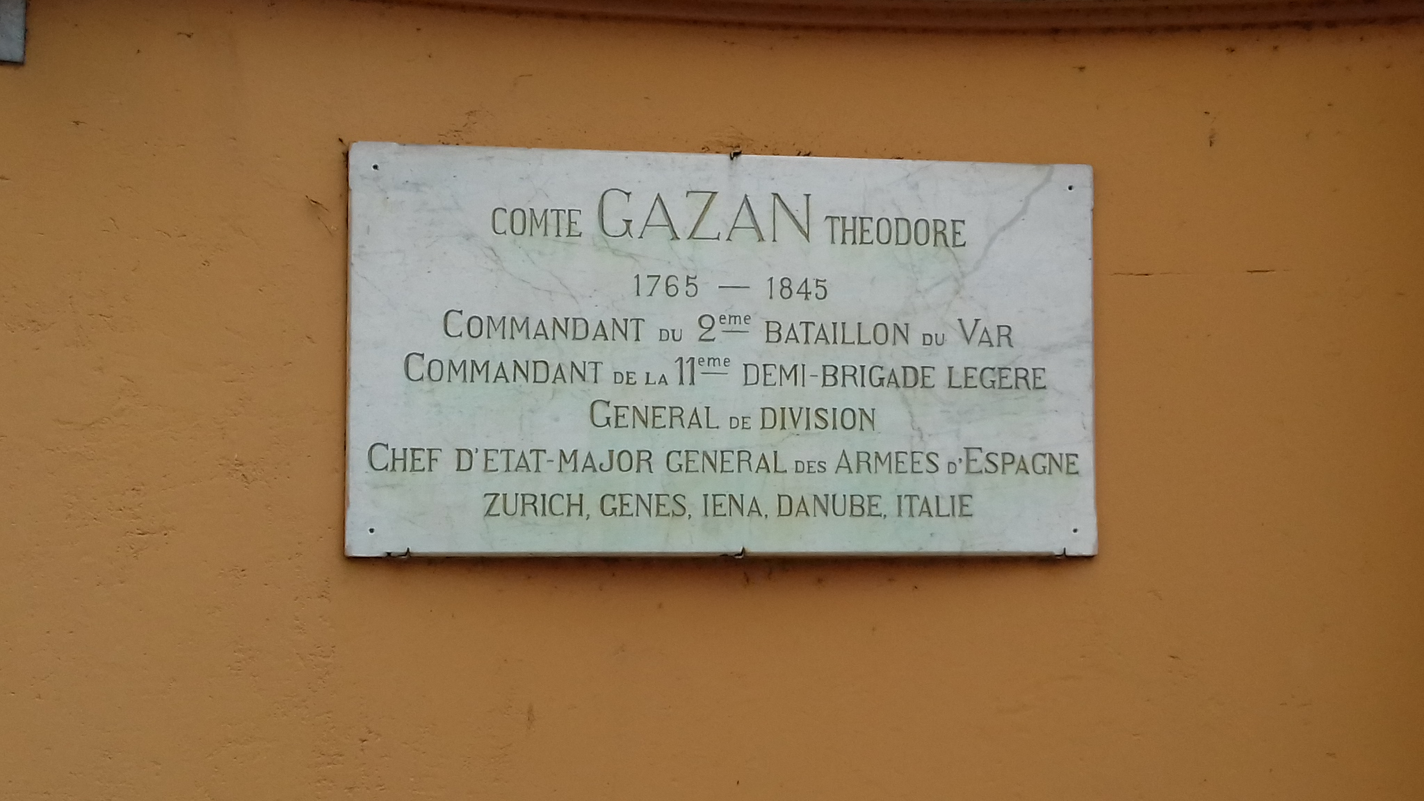 dans les rues d'Antibes